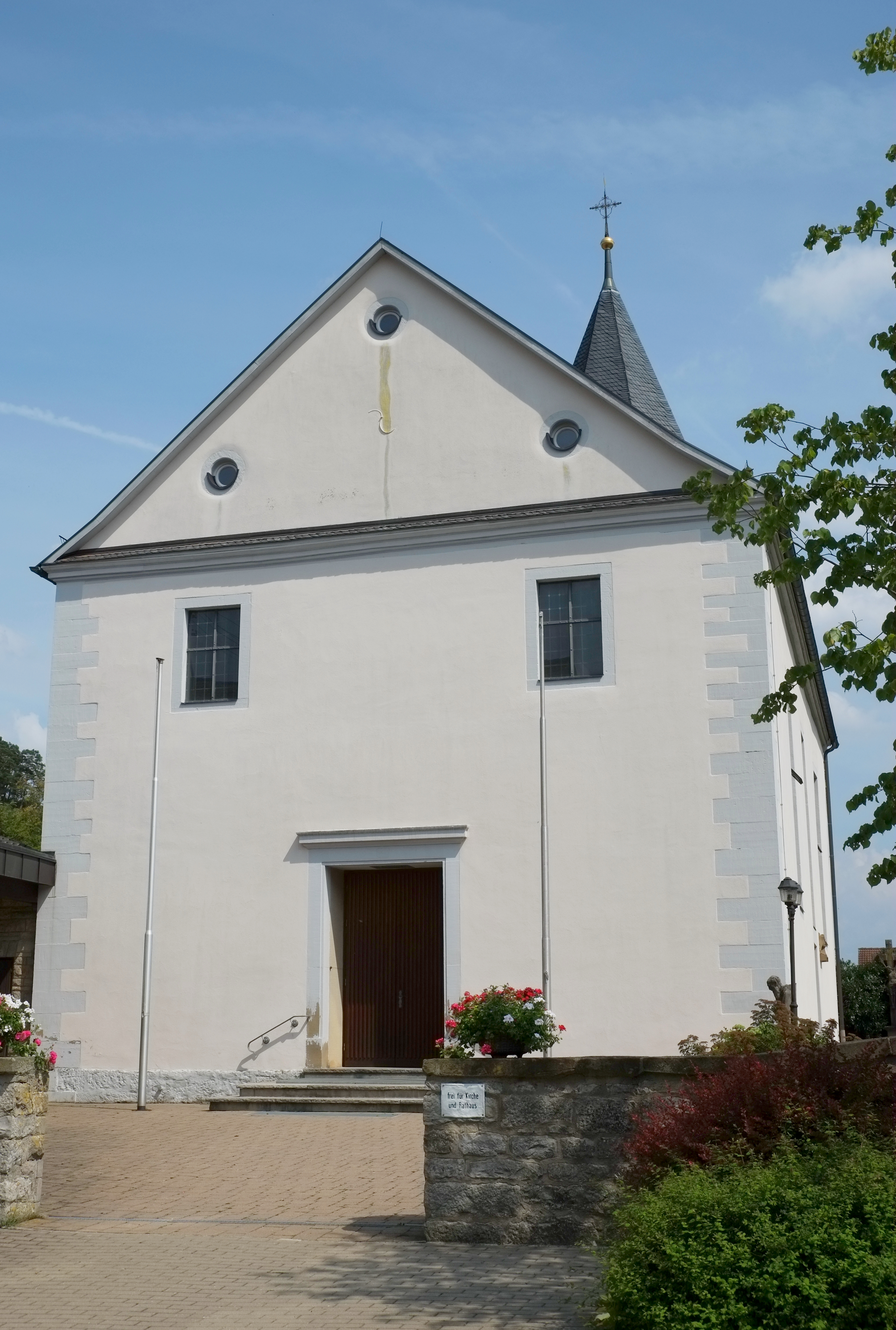 Katholische Pfarrkirche Mariä Himmelfahrt in Sindeldorf, einem Ortsteil von Schöntal im Hohenlohekreis (Baden-Württemberg, Deutschland)